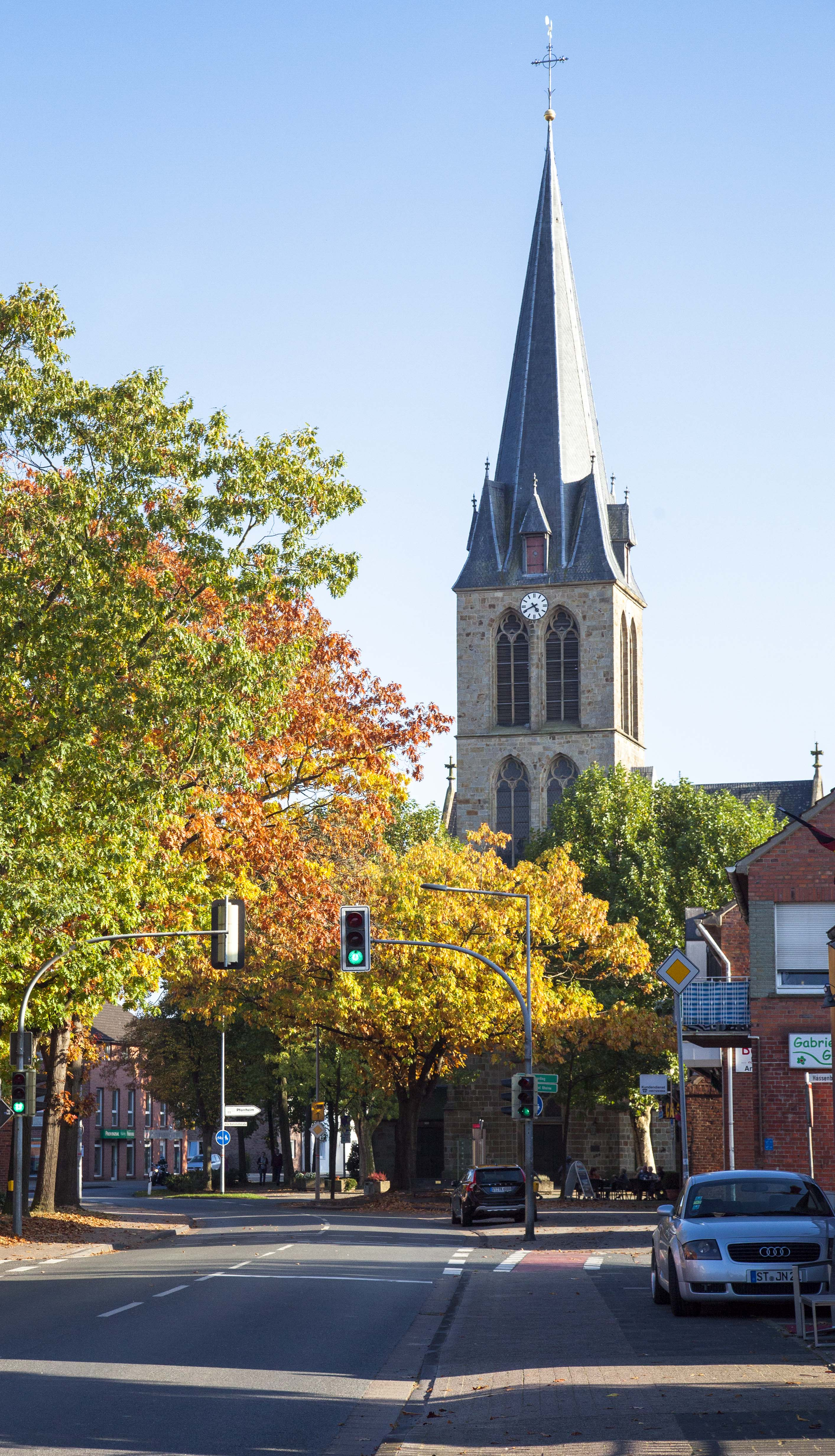 Turm St. Johannes, Mesum